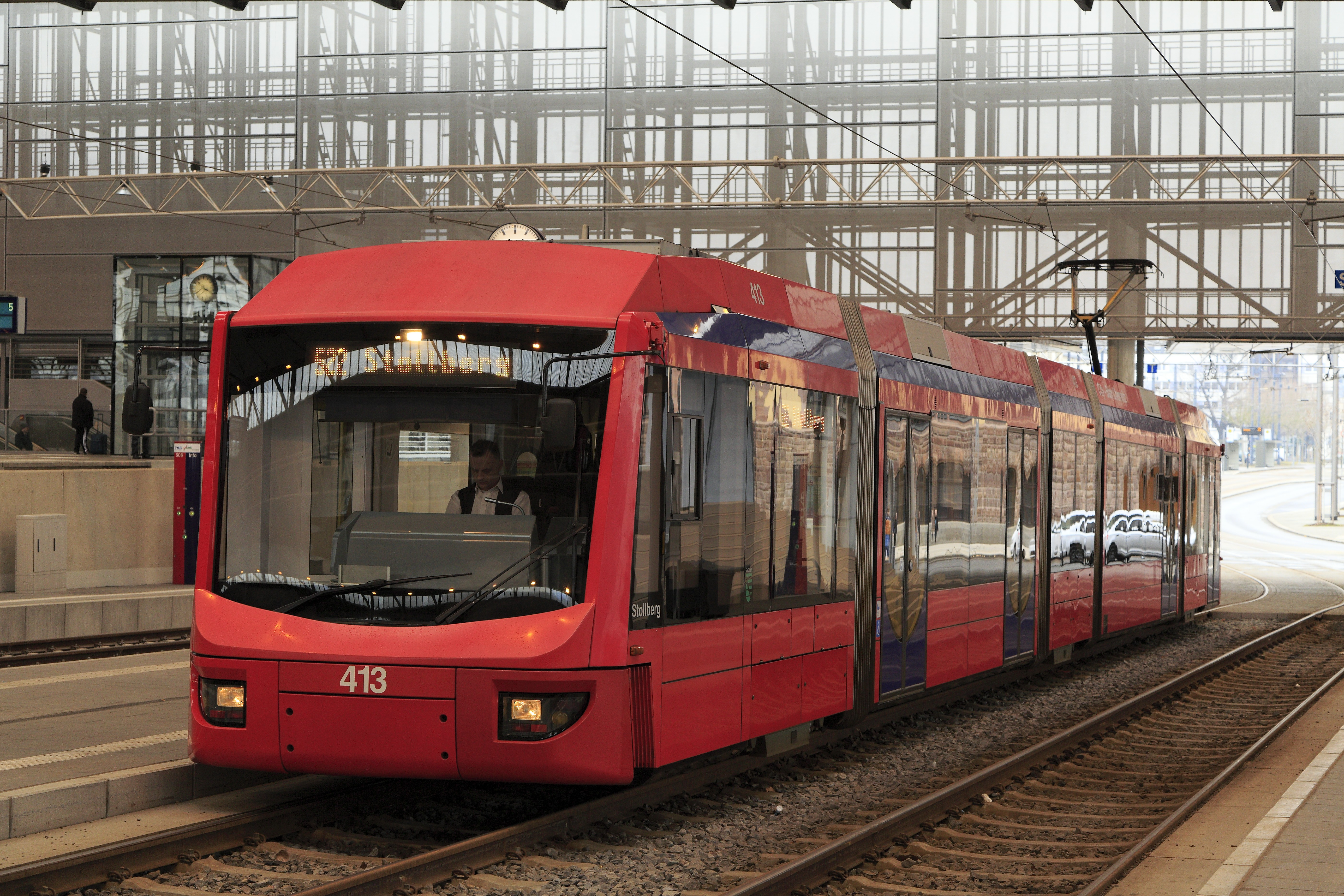 … auf dem Bahnsteiggleis 2 im BOStrab-Bereich. Die Citybahn-Züge der Linie 522 durchfahren die Wendeschleife Chemnitz Hbf entgegen dem Uhrzeigersinn und stehen hier zum Ausgleich von Verspätungen mehrere Minuten. Das Drehen der Einheiten bei jeder Fahrt sorgt zusätzlich für gleichmäßigen Radreifenverschleiß.